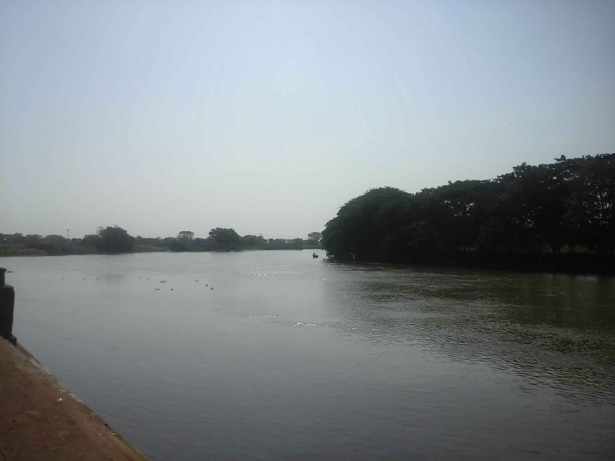 Esta fotografía fue tomada en el municipio colombiano con código 23417.